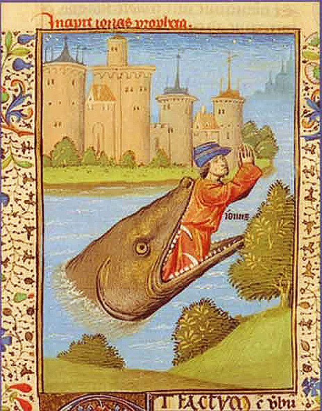 Jonas rejeté par la baleine. Enluminure de la Bible de Jean XXII. École française du XIVe siècle